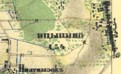 Деревня Иципино на карте 1860 года.